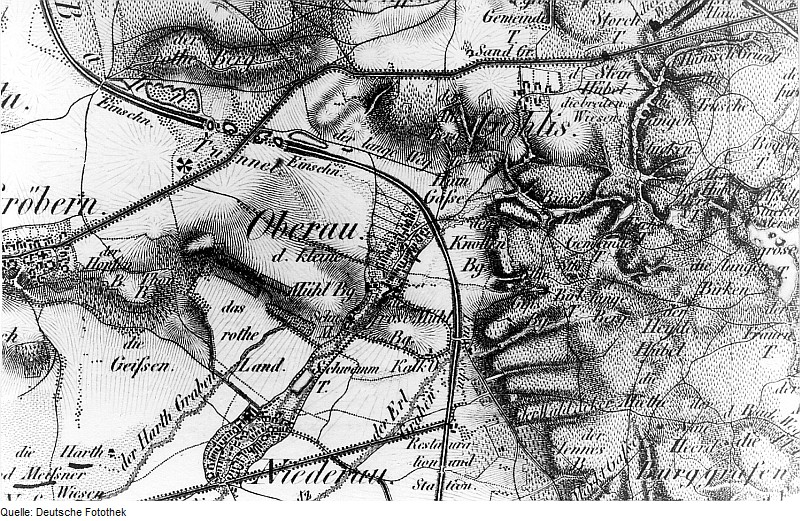 Original image description from the Deutsche Fotothek Niederau-Oberau. Oberreit, Sect. Großenhain, 1841/43